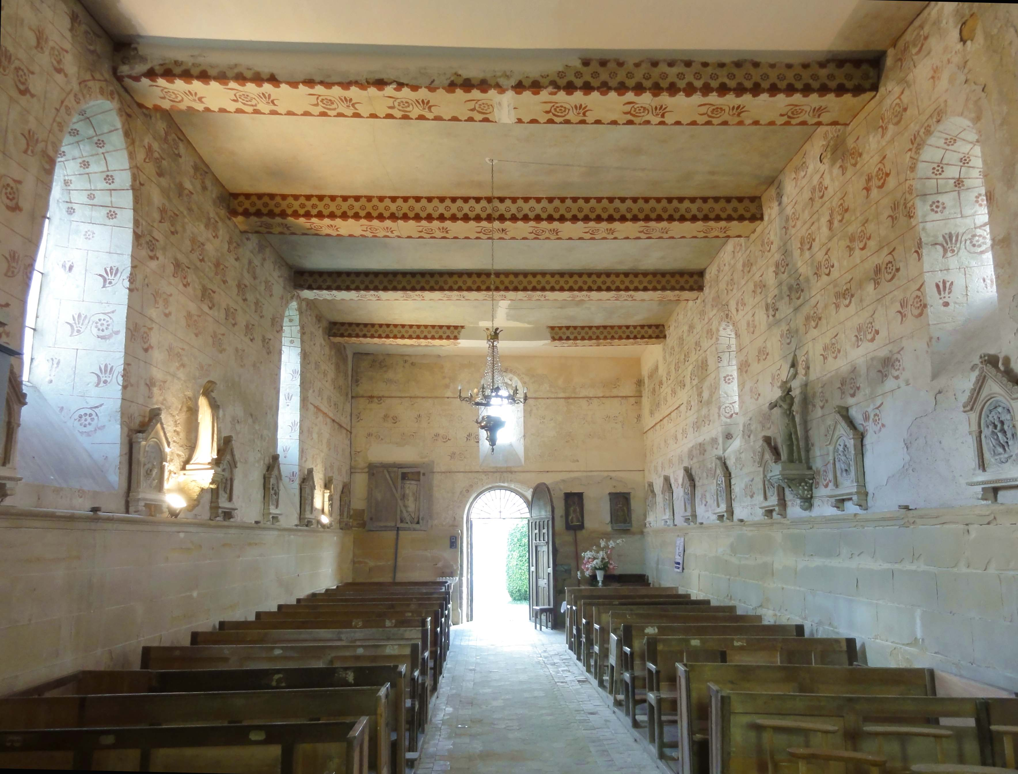 Intérieur de l'église - voir titre.